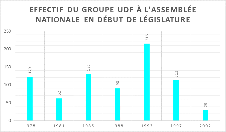 Effectif du groupe UDF en début de législature